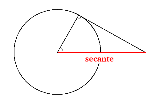 rápida visualização do que é a secante em trigonometria